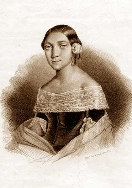 Soprano Marianna Barbieri-Nini